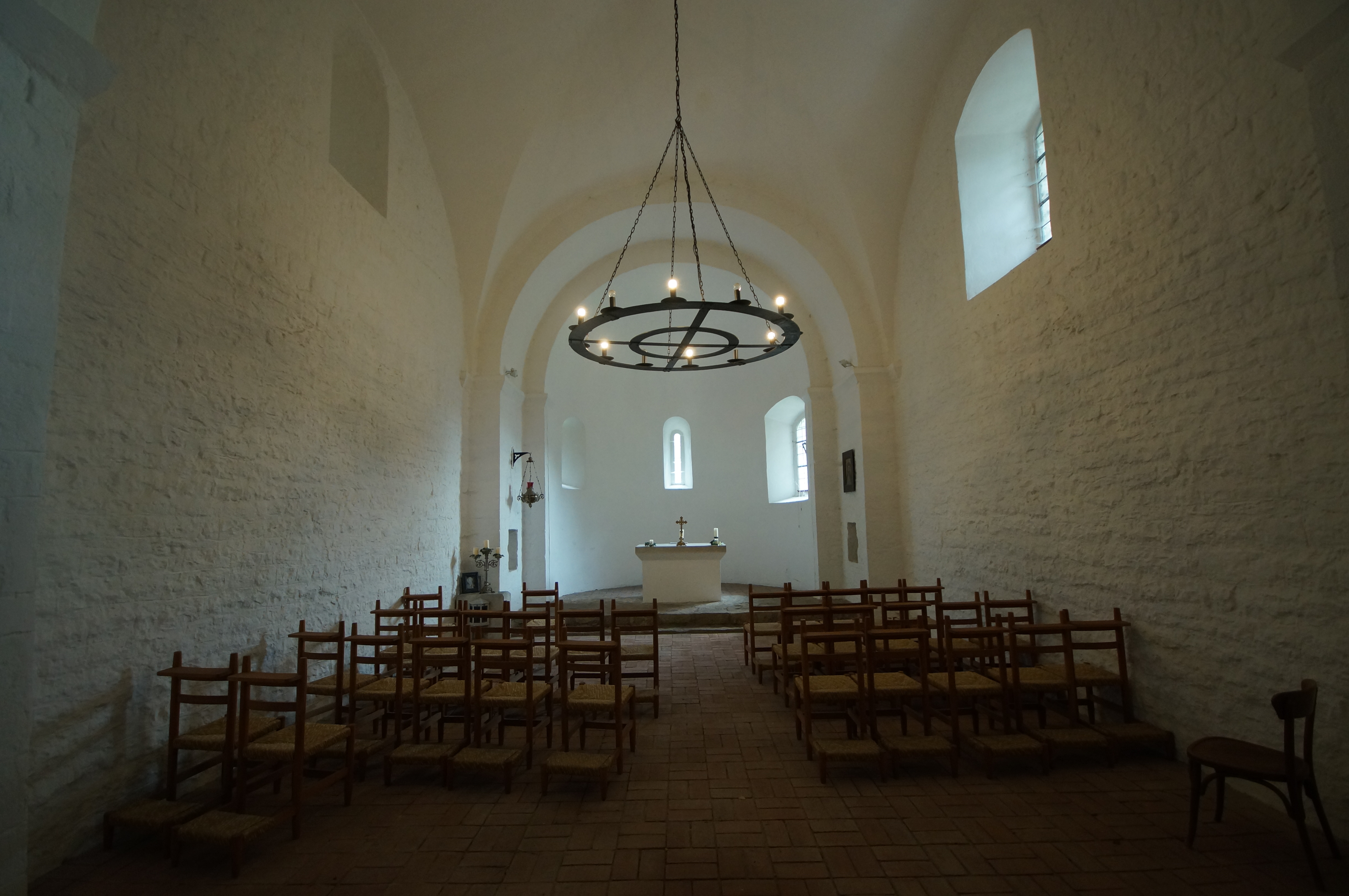 Kreuzhofkapelle Regensburg: Innenraum, Blick zur ApsisThis is a photograph of an architectural monument.